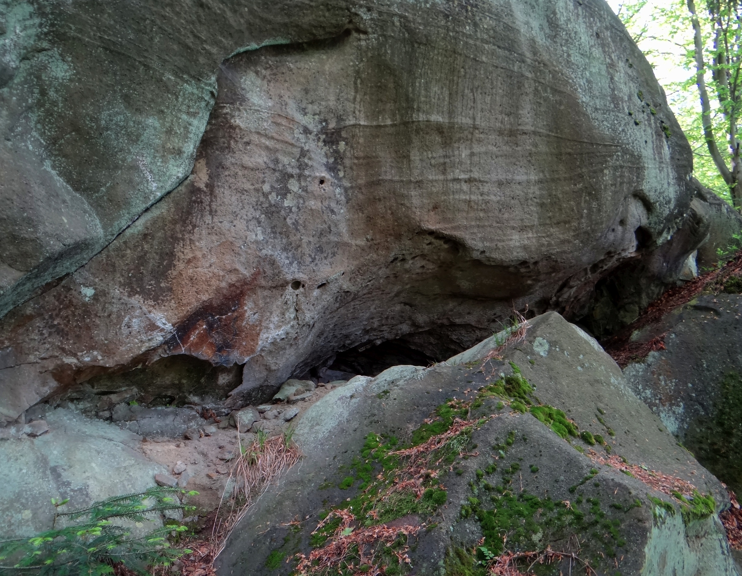 Schronisko Tymoteusza w rezerwacie Diable Skały w Bukowcu